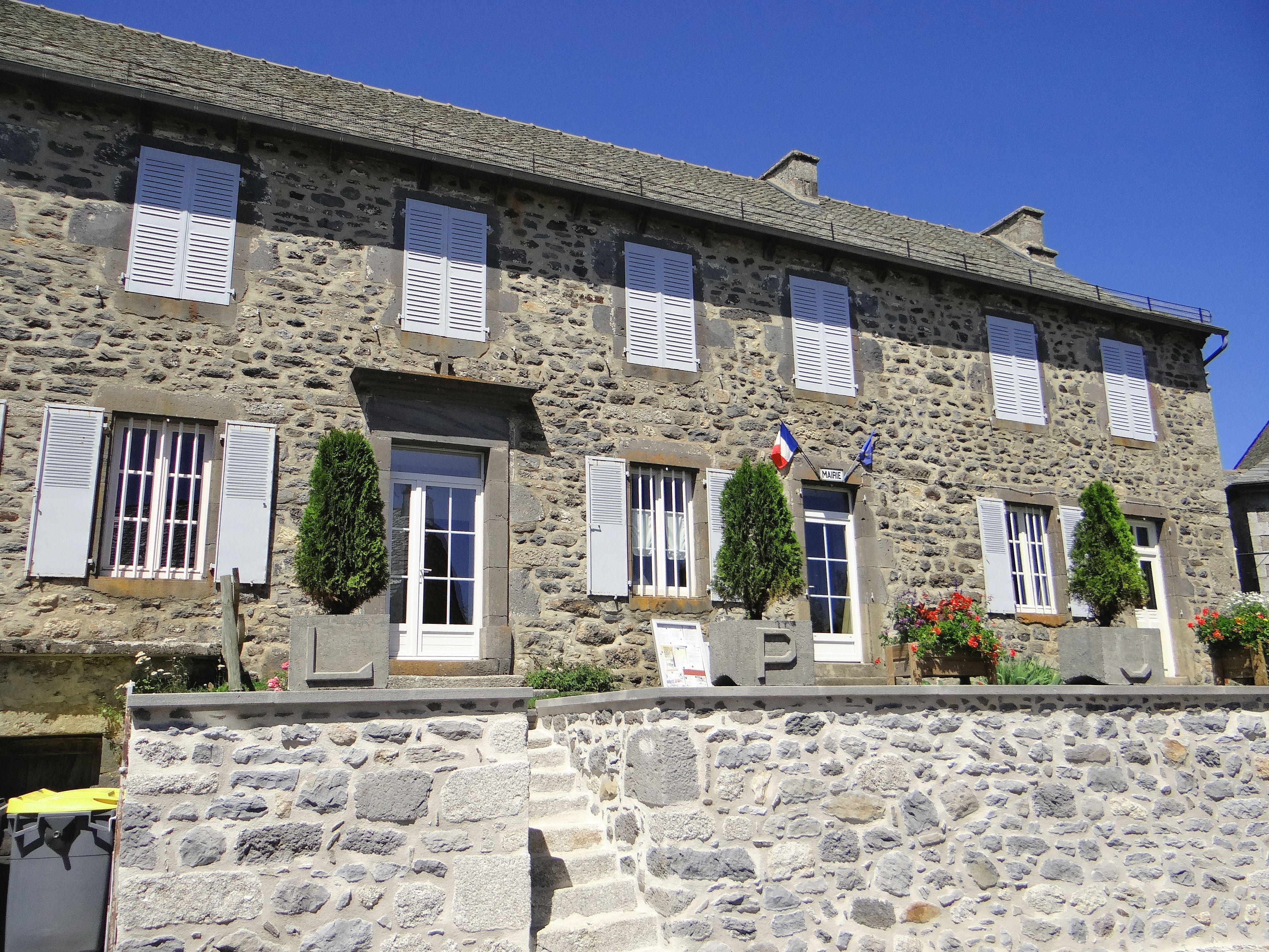 Alpuech - Mairie